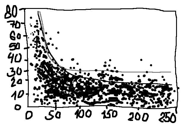 Graf znázorňuje množství falešně pozitivních výsledků. Délkově-závislá hranice signifikantní sekvenční identity: původní křivka HSSP. Hlavní svislá osa grafu znázorňuje párovou sekvenční identitu a hlavní vodorovná osa grafu značí délku alignmentu.